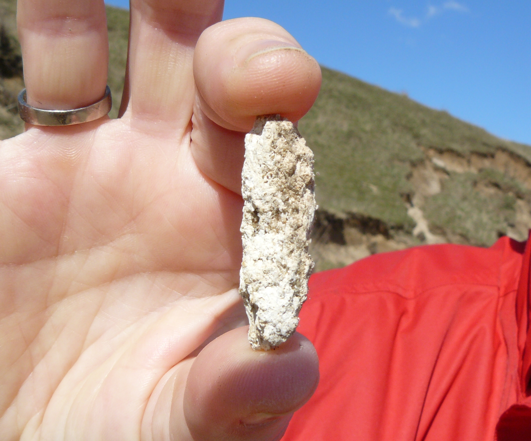 Osteokolle vom Dummersdorfer Ufer in Lübeck